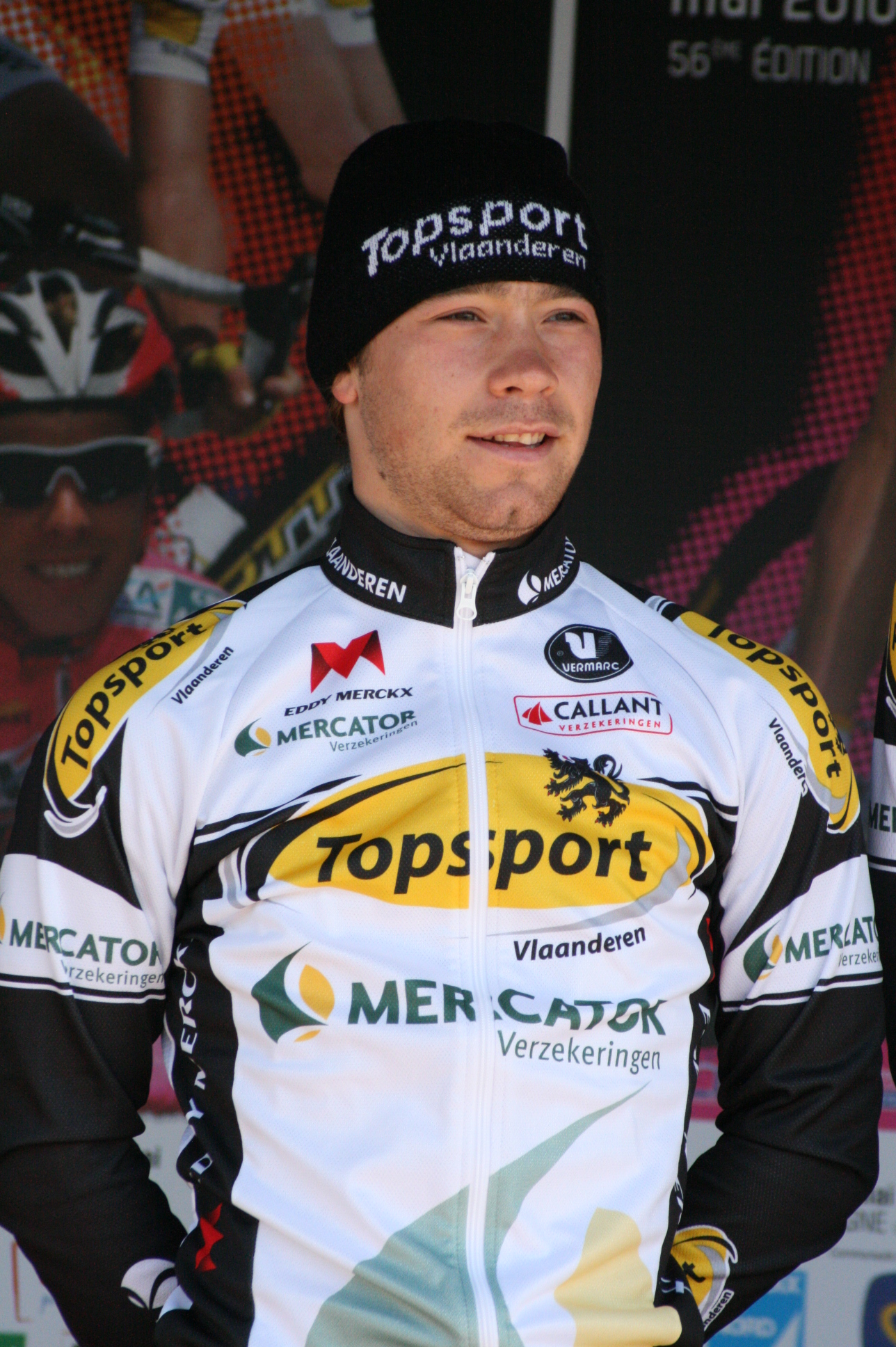 Michael Van Staeyen, lors de la présentation des équipes des 4 jours de Dunkerque 2010